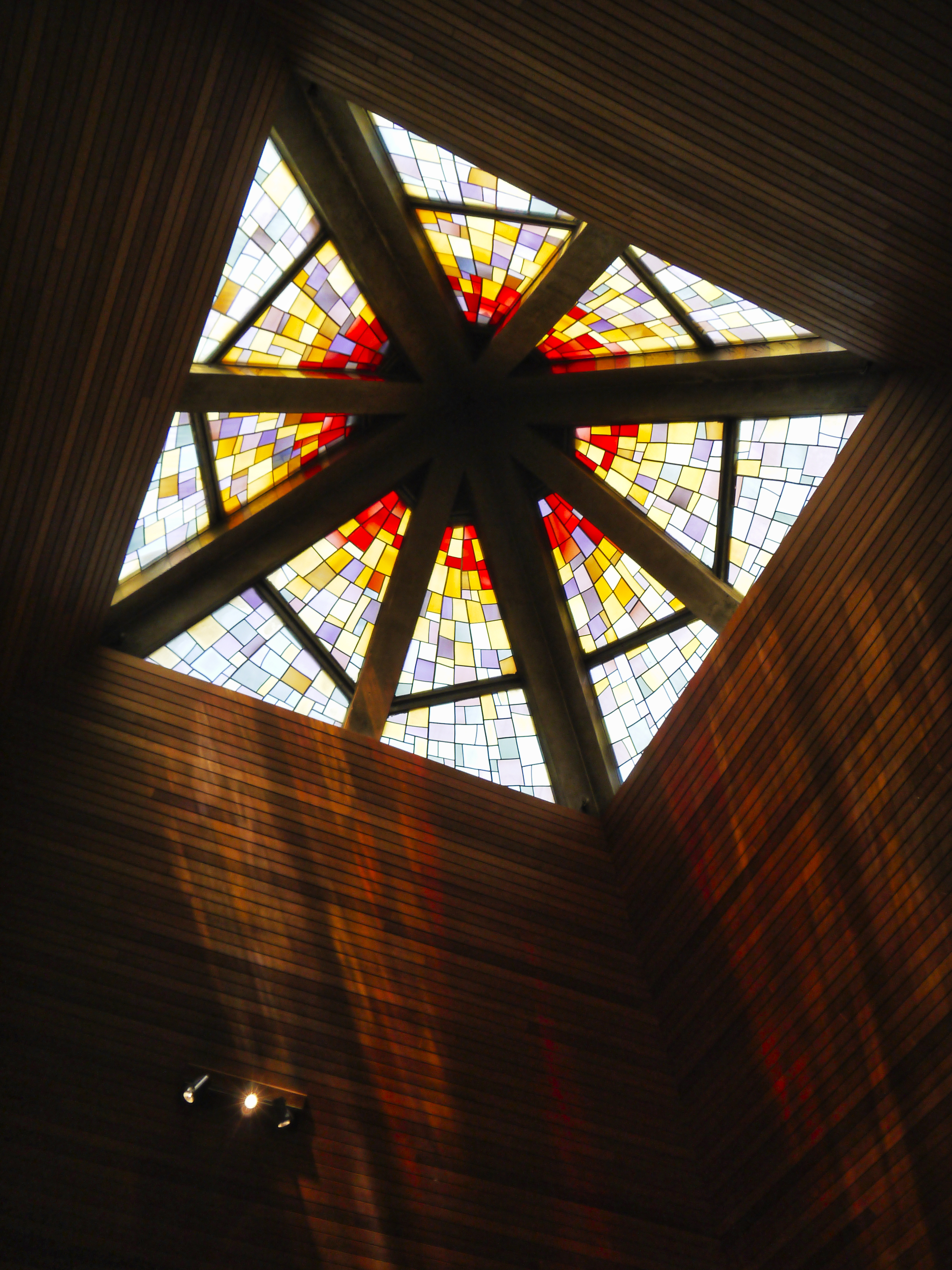 Kirchendach der Evangelischen Kirche A.B. Wien-Hetzendorf